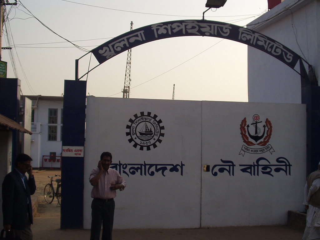 থুলনা শিপইয়ার্ড গেট